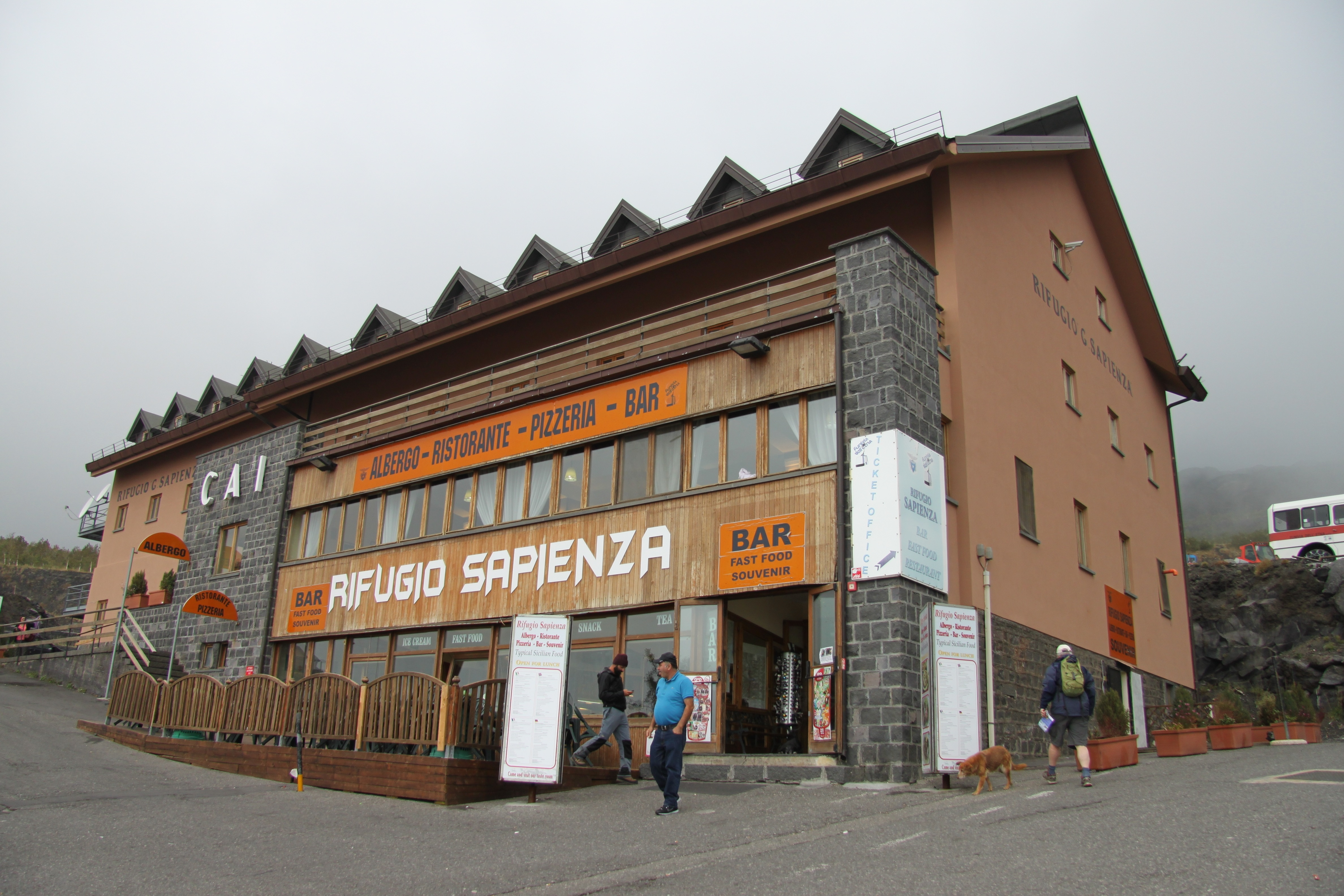 Mount Etna - Rifugio Sapienza